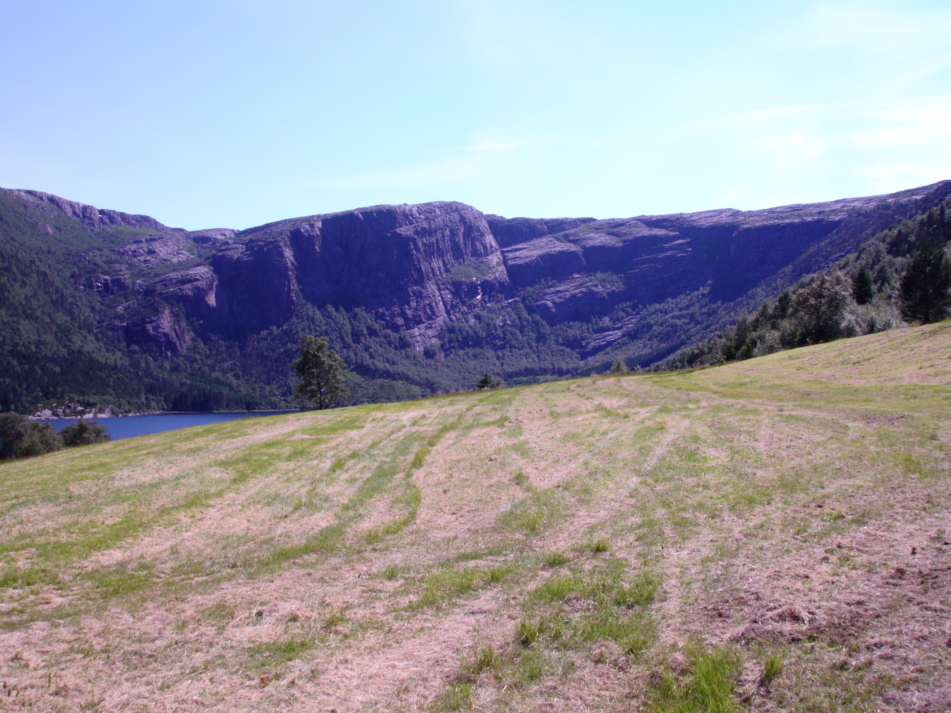 Vindspollen med Middagsfjellet i bakgrunnen.